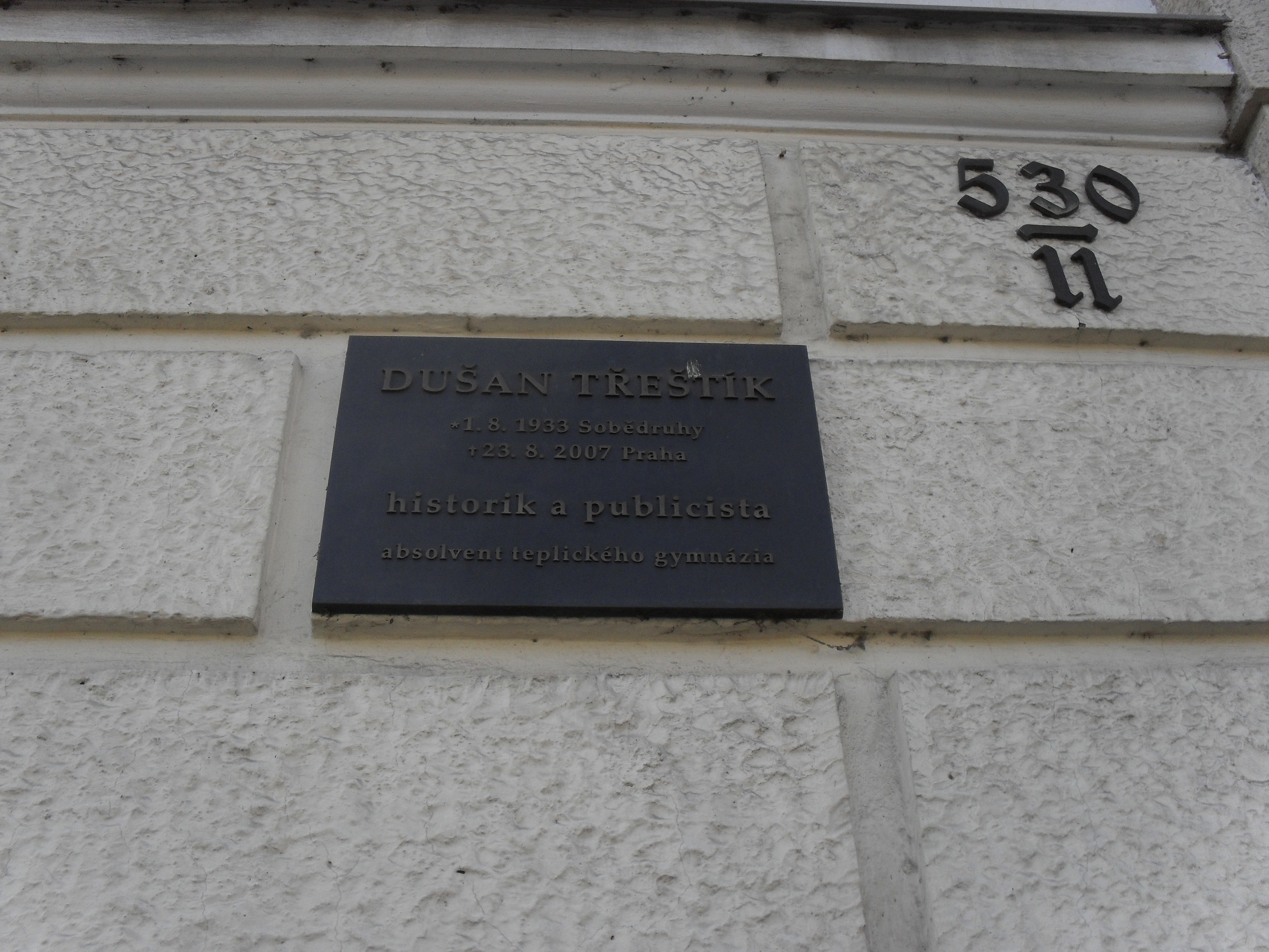 Teplické Gymnázium - Čs. dobrovolců 530/11, Teplice